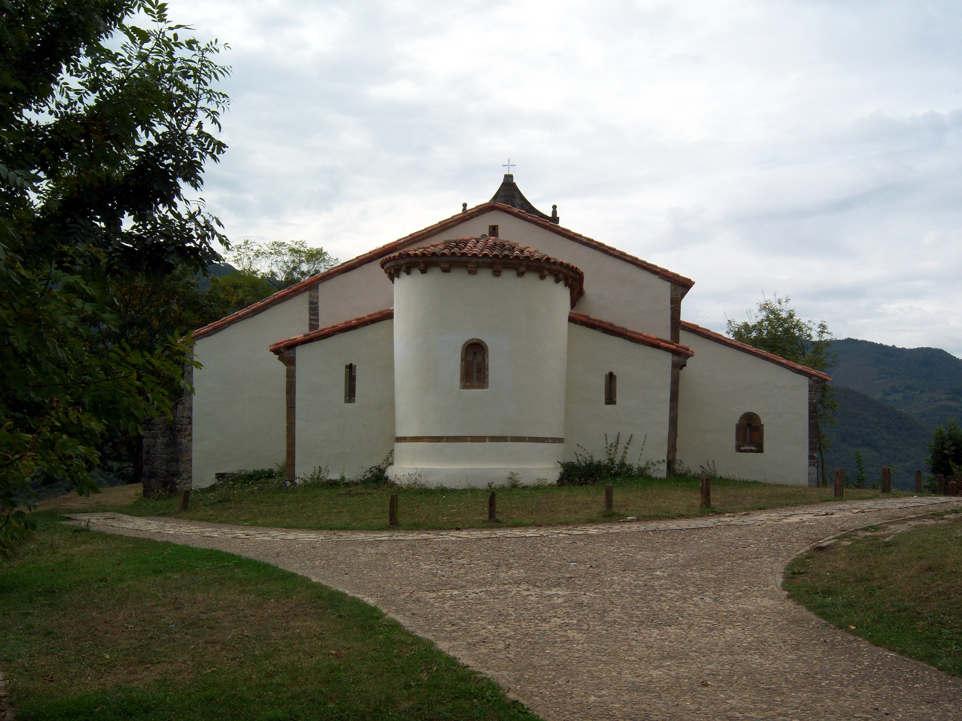 Vista general de la Iglesia de San Vicente y camino a seguir, declarada Bien de Interés Cultural en 1983. Situada en Serrapio, concejo de Aller, Asturias.